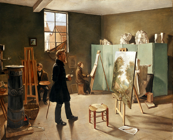 Diese - hier nur bescheiden kleine - digitale Wiedergabe eines Ölgemäldes aus dem Besitz der Museumslandschaft Hessen Kassel zeigt das Ölgemälde des Malers und späteren Fotografen Ferdinand Tellgmann unter dem Titel Im Atelier. Das Werk ist rückseitig signiert und datiert 1834. Zum Werk vermerkt die Besitzerin: „Blick in ein Künstleratelier: der schmucklose Raum ist durch ein hochgelegenes Fenster in nüchternes Gegenlicht getaucht. Zwei Schüler sitzen an der Rückwand nahe dem Fenster vor ihren Staffeleien. Der Meister selbst steht vor seiner Staffelei und arbeitet, Malstock und Palette in den Händen haltend, an einem großen Landschaftsbild. Hinter einem Paravent im Hintergrund rechts sind, zum Teil verdeckt, Gipskopien antiker Figuren und Büsten aufgestellt, davor ist eine in Stoff gehüllte Modellpuppe platziert. Auf anschauliche Art dokumentiert Tellgmann hier die Arbeitsweise und die Atmosphäre in einem Maleratelier während des Unterrichts. “ ...